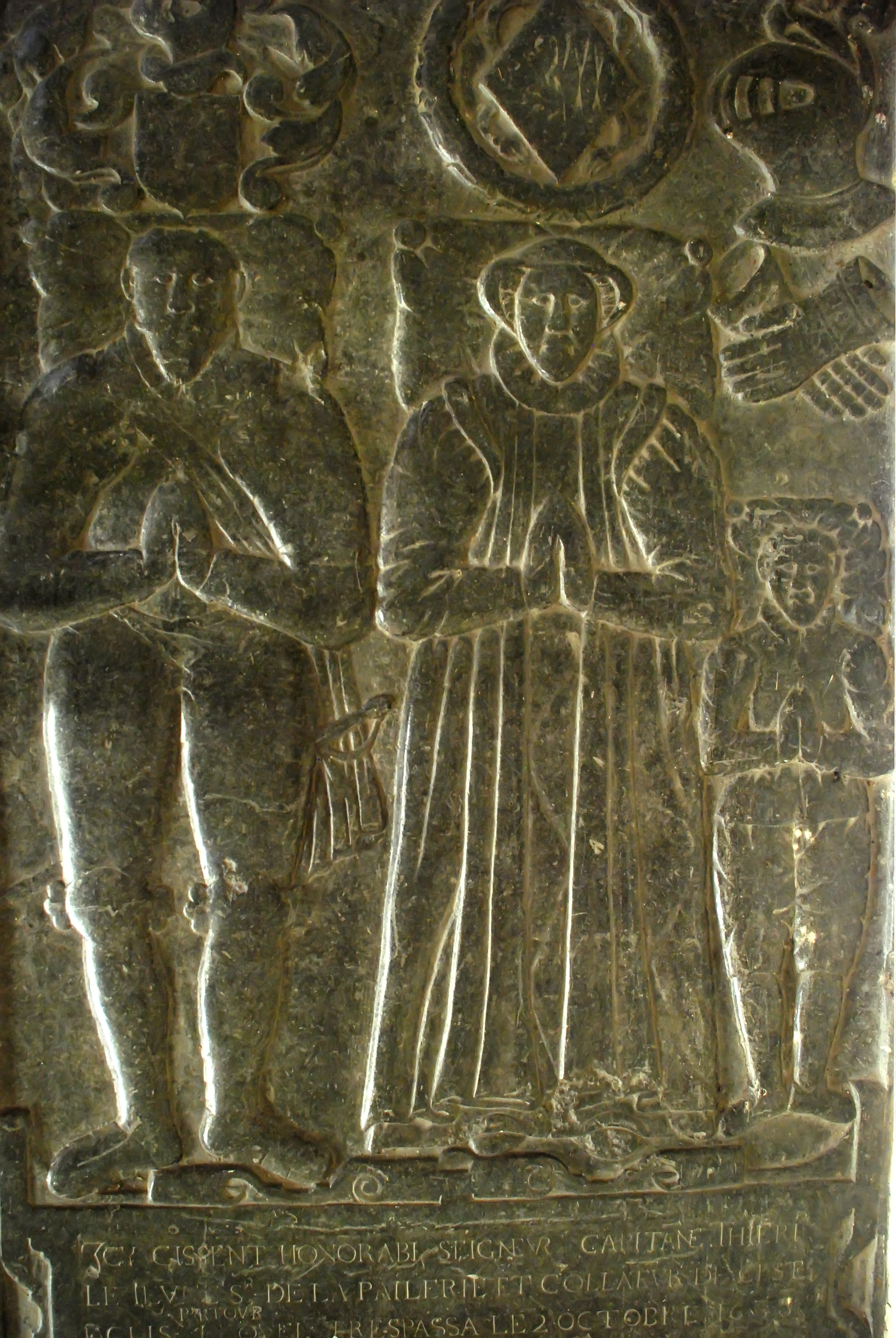 Belgique - Église Saint-Barthélémy de Bousval